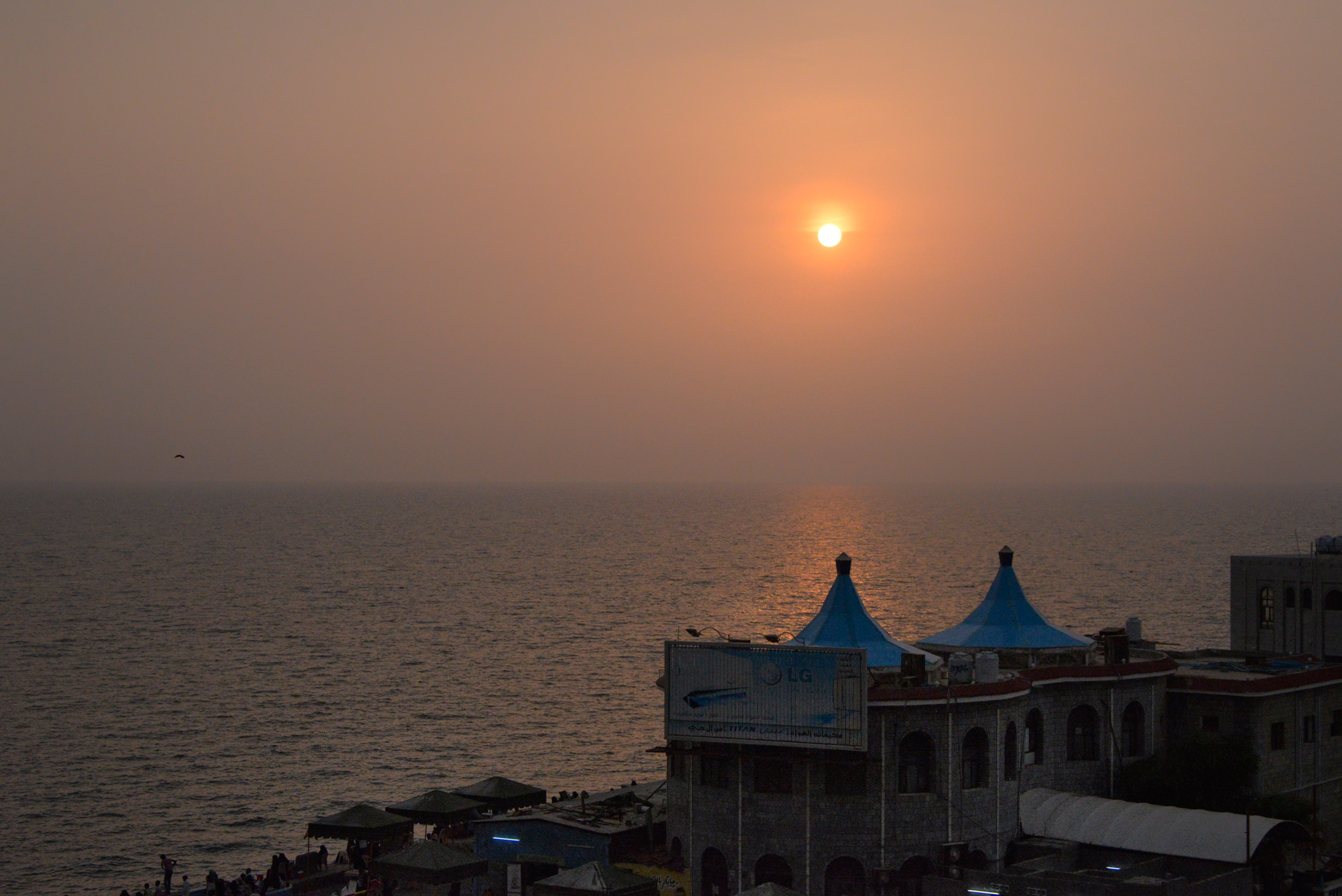 Hodaidah Sunset, Yemen